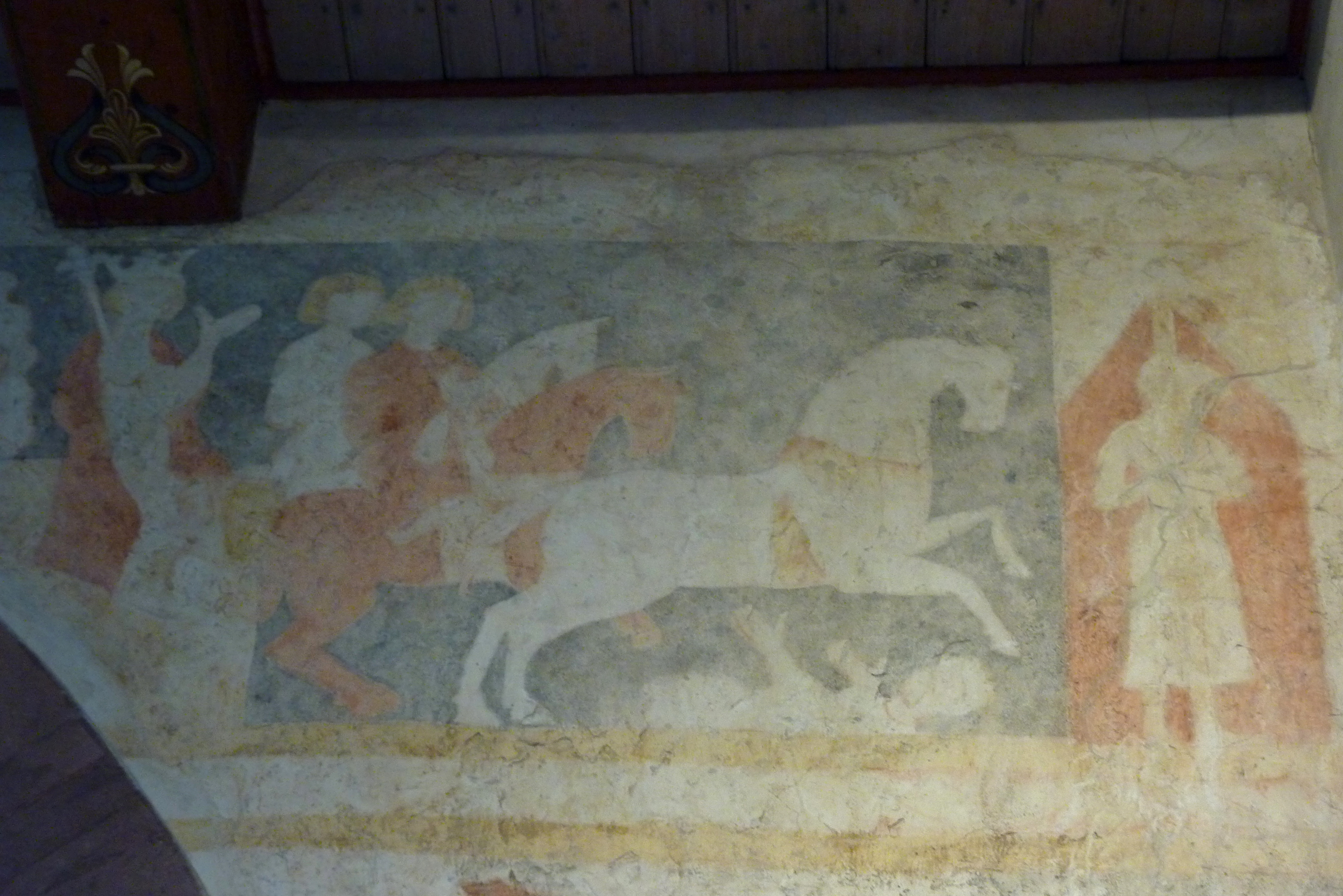 Evangelische Kirche in Fraurombach, einem Stadtteil von Schlitz im Vogelsbergkreis (Hessen), gotische Wandmalerei aus der ersten Hälfte des 14. Jahrhunderts, Darstellung: Szene des Herakliuszyklus